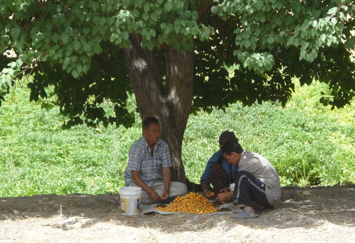 Familie bei der Aprikosenernte und Verarbeitung unter einem grossen Aprikosenbaum